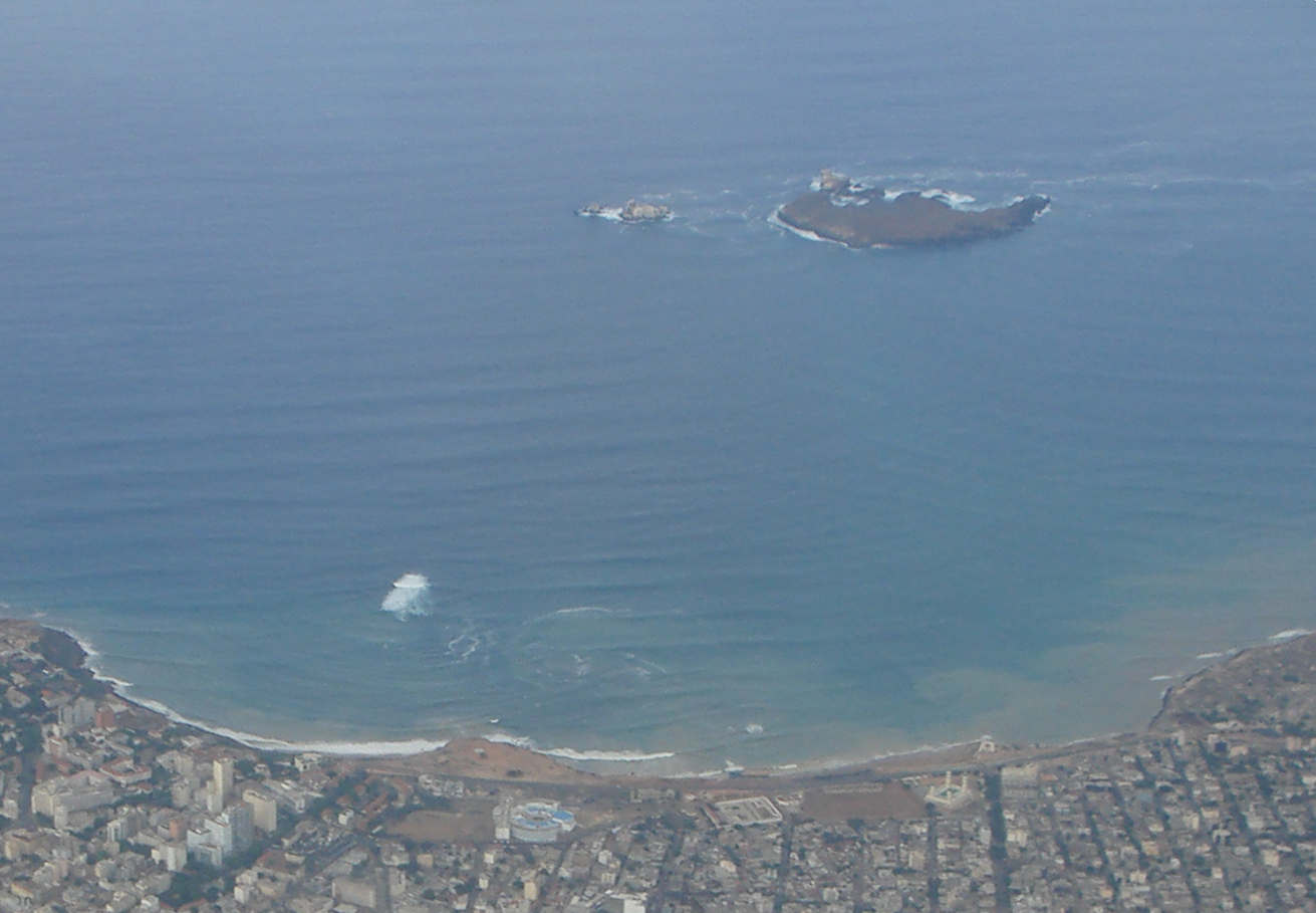 Vue aérienne du port de Dakar et des îles de la Madeleine (Sénégal)